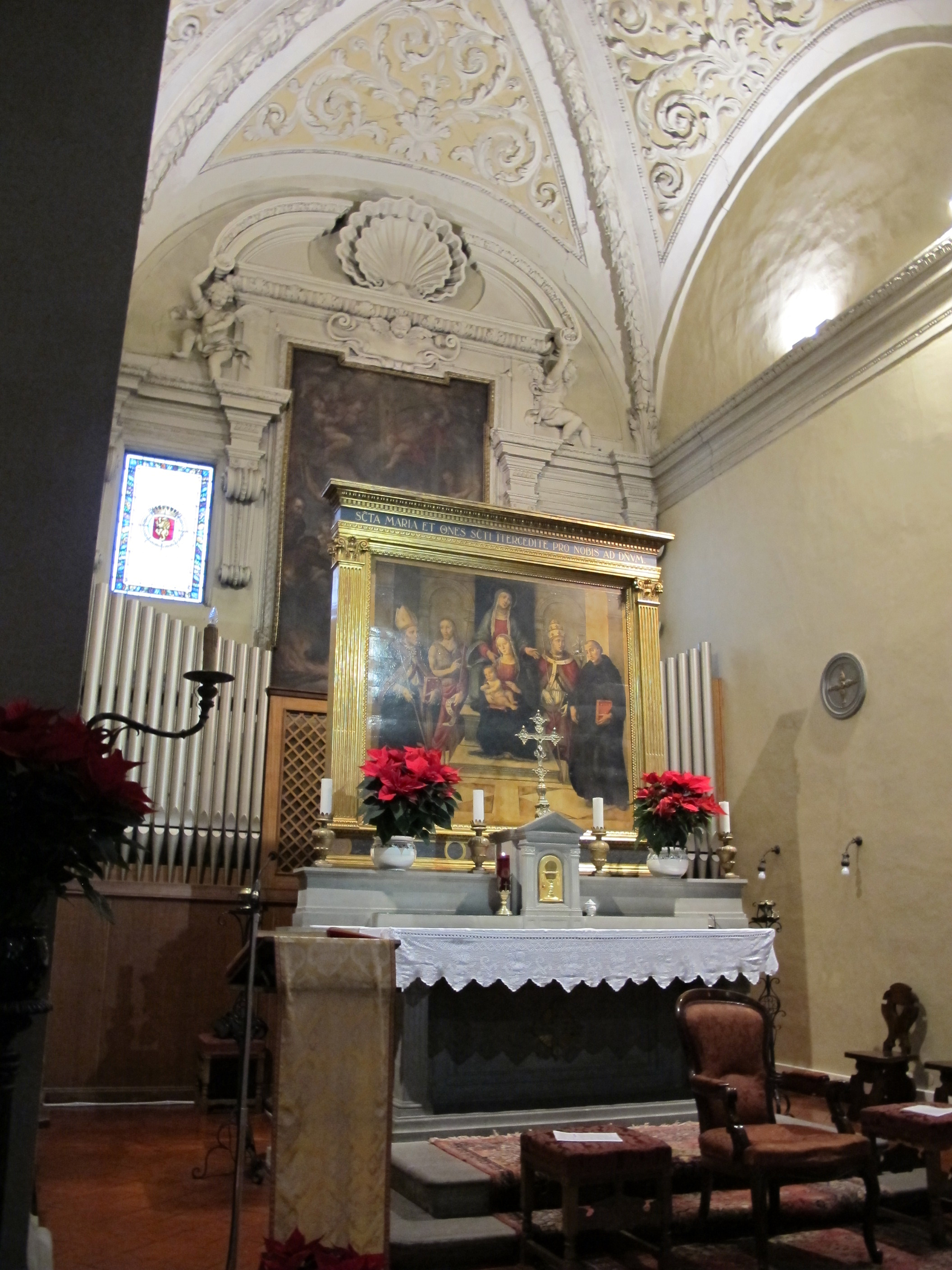 S. lucia dei magnoli, int., altare maggiore di scuola f.na del xvi sec.